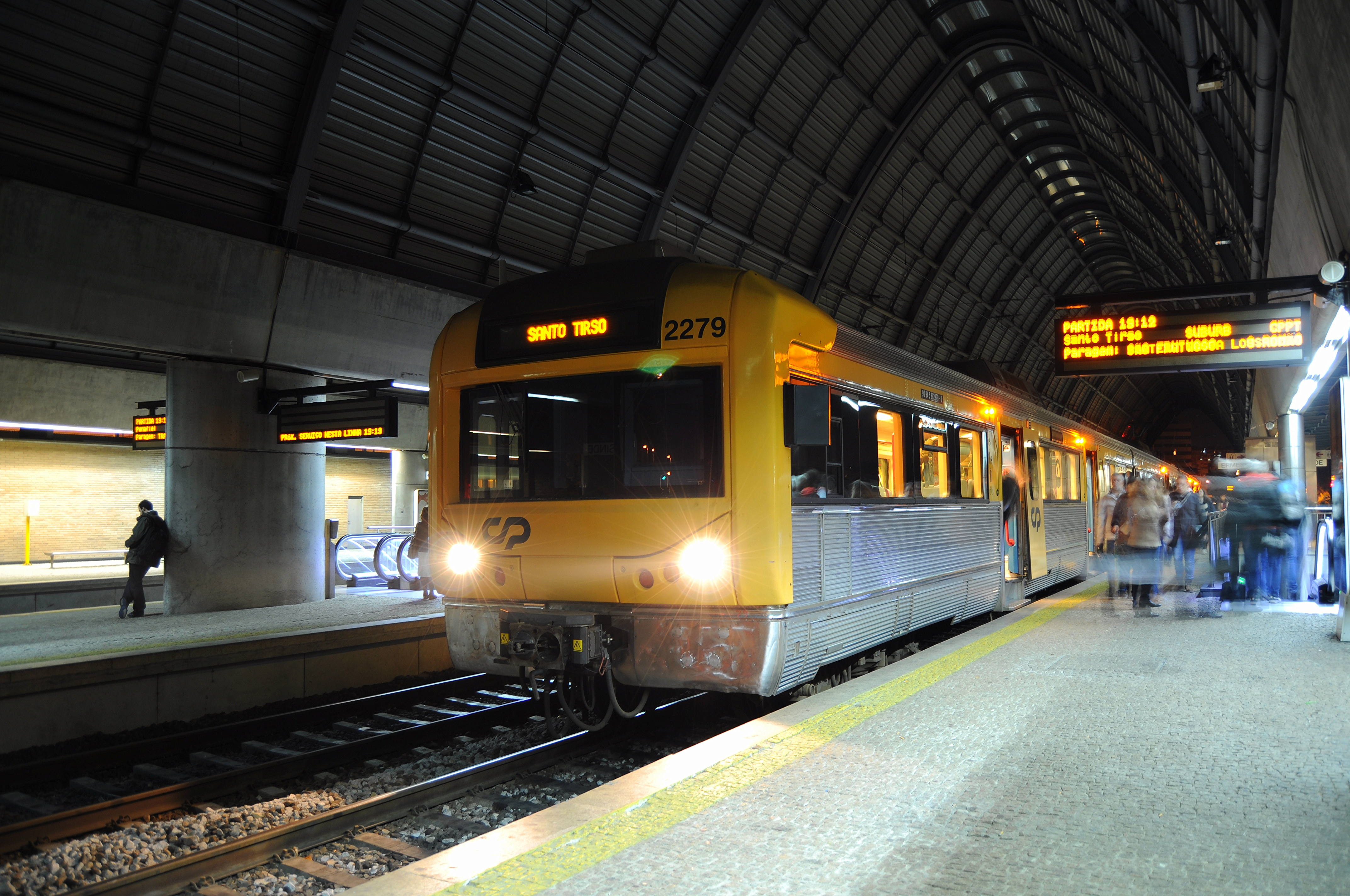 CP 2240 - Ermesinde